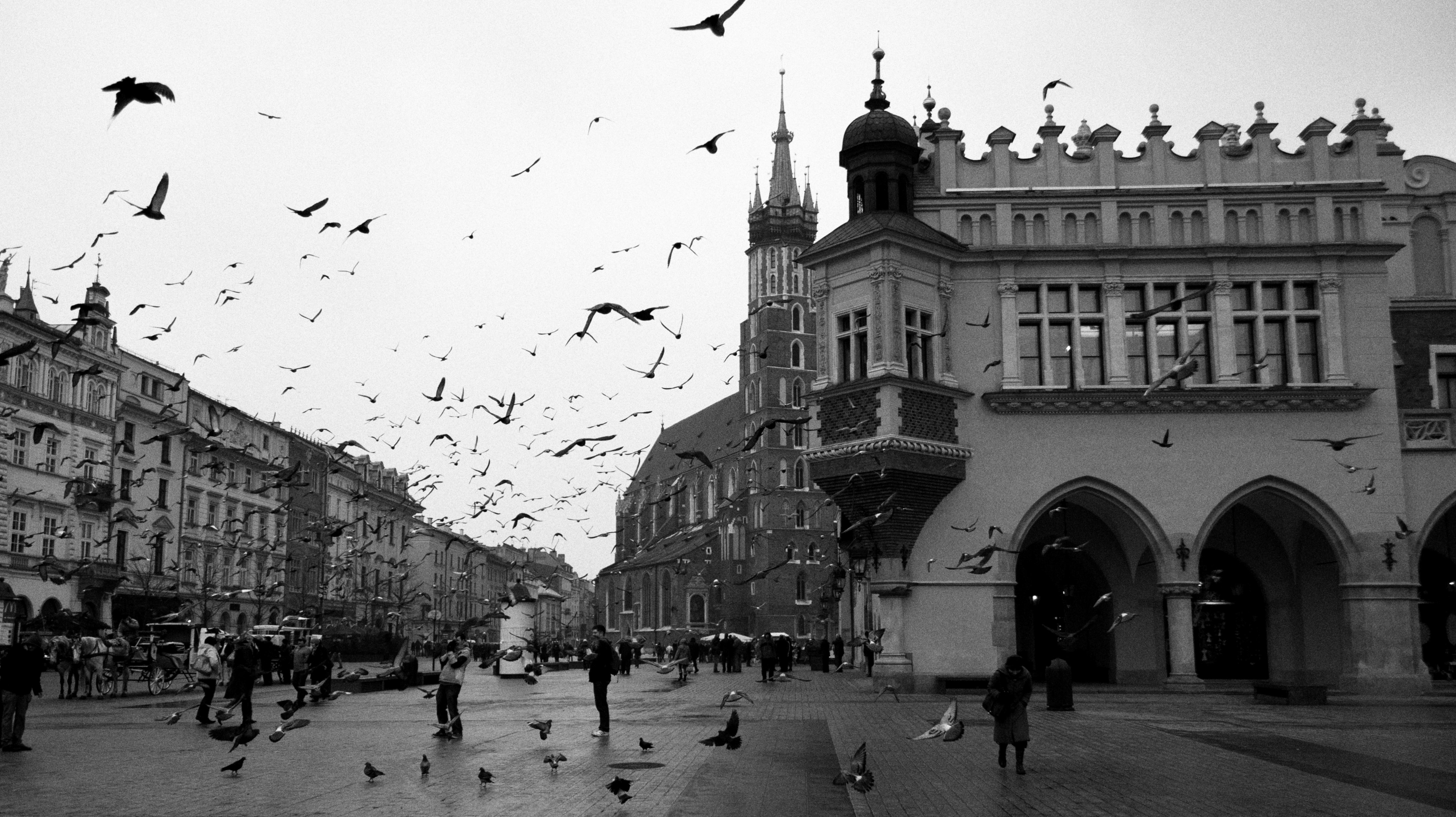 Place du marché de Cracovie